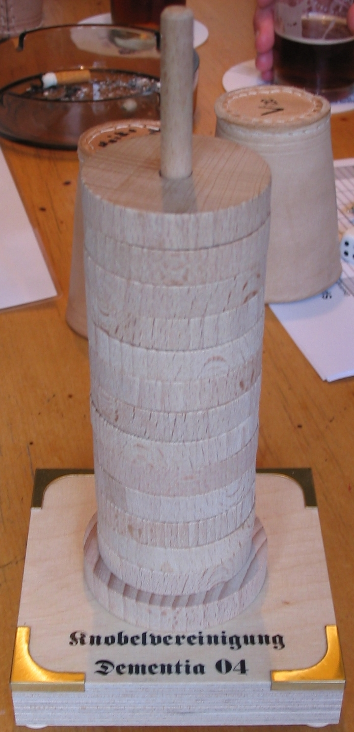 Ein typisches Besteck wie es im Würfelspiel Schocken Verwendung findet.